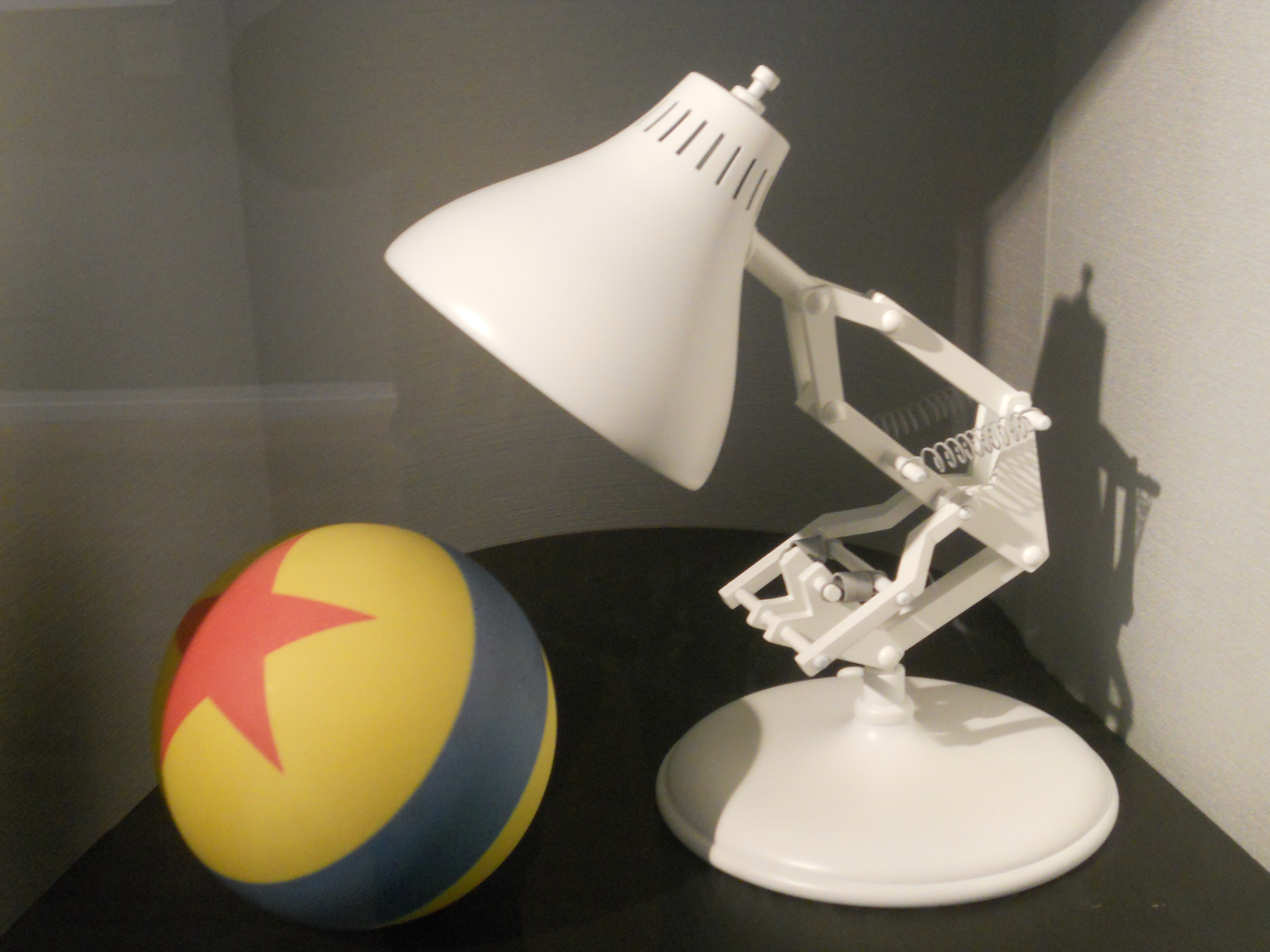 Mostra Pixar al PAC (Padiglione d'Arte Contemporanea) di Milano